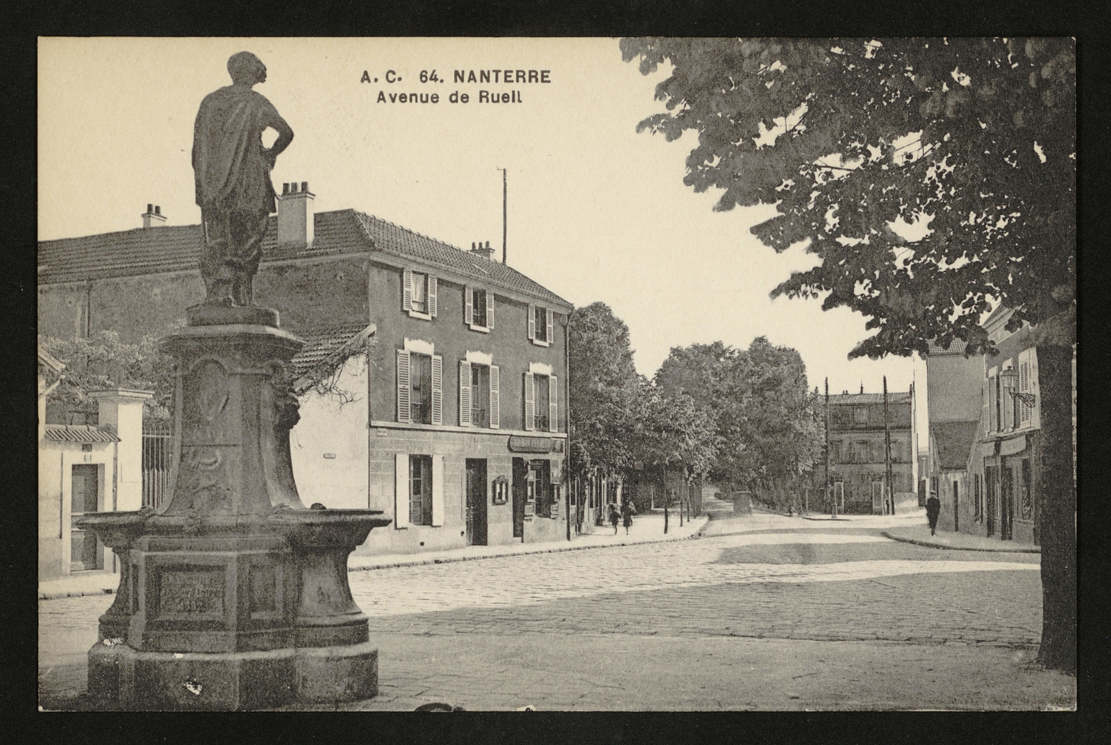 Nanterre.Avenue de Rueil.Statue